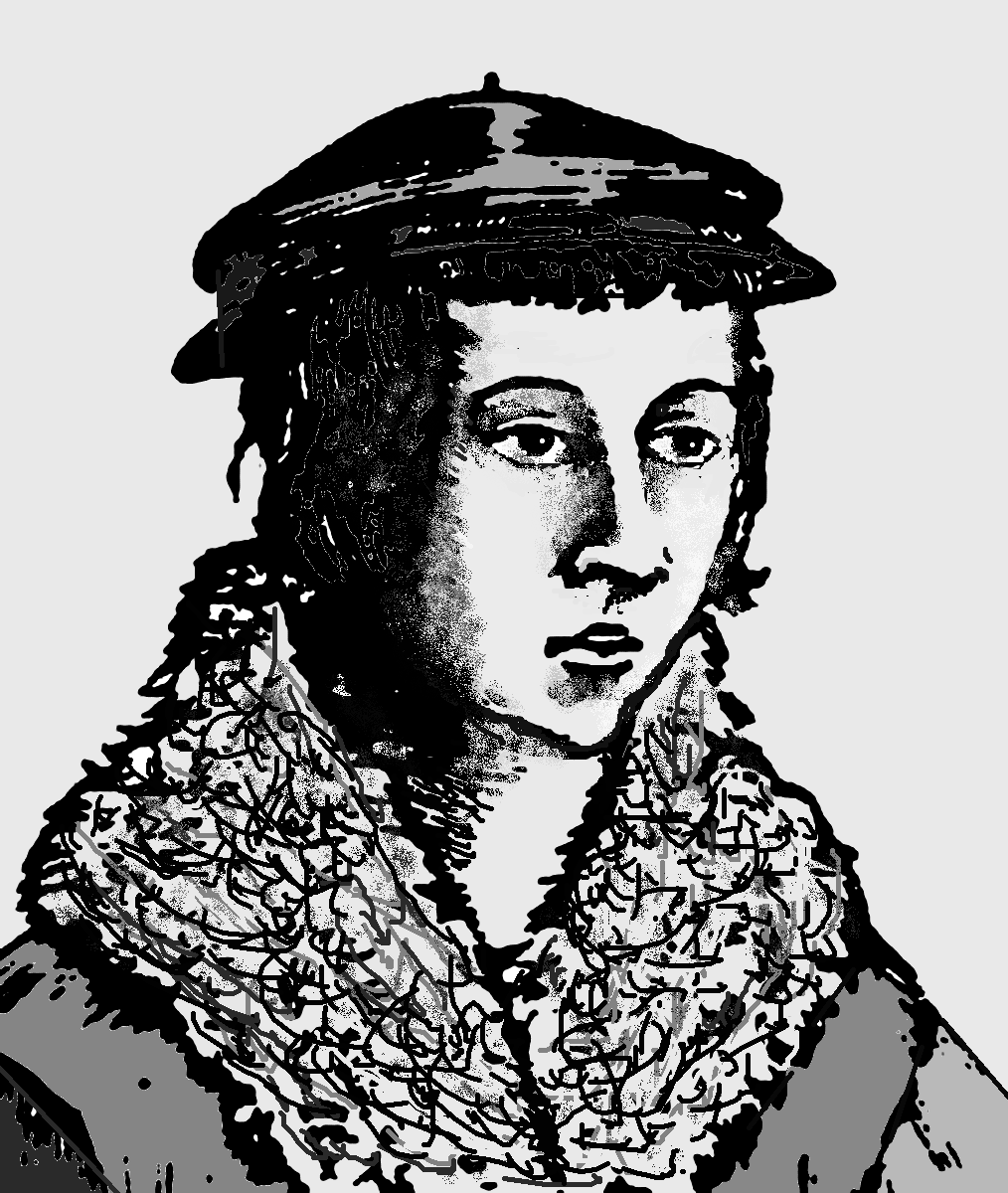 Dibujo propio sobre un grabado de Juan Lorenzo Palmireno